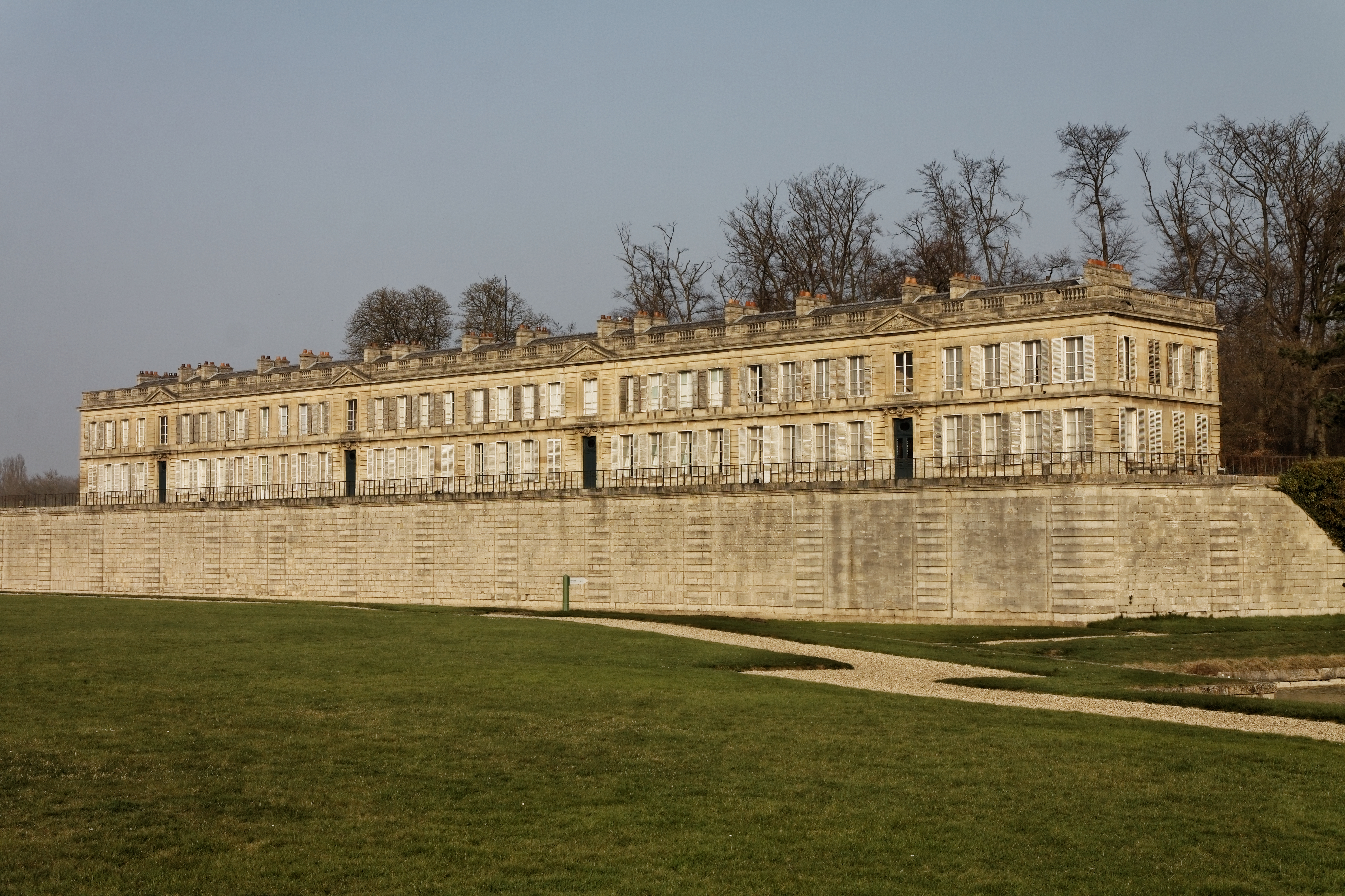 Le château d'Enghien, à côté du château de Chantilly.